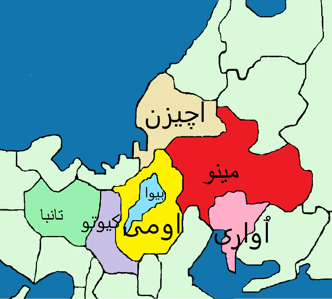 منطقه تحت نفوذ خاندان سایتو در سال 1548